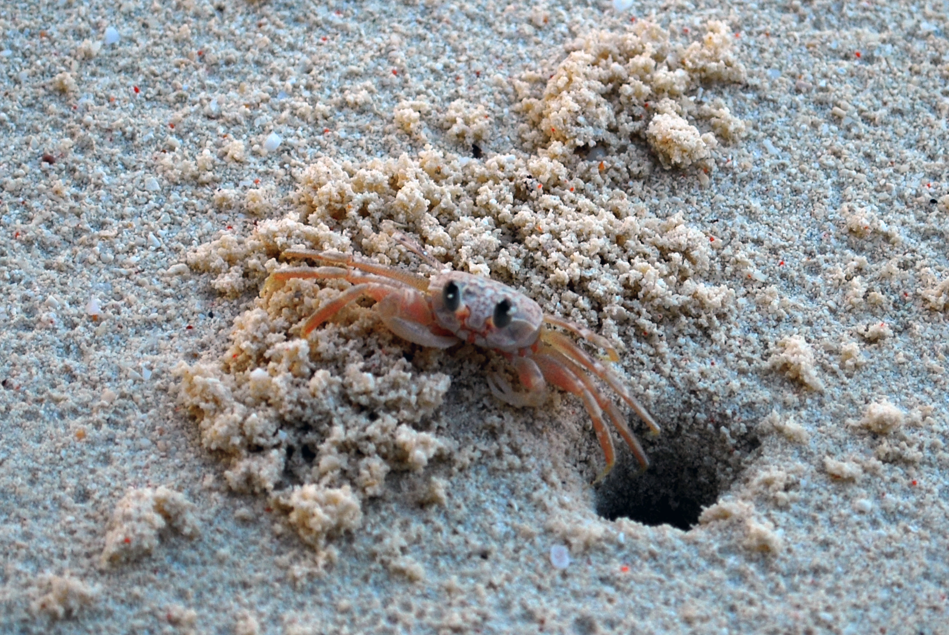 Ocypode ryderi from Zanzibar, Tanzania